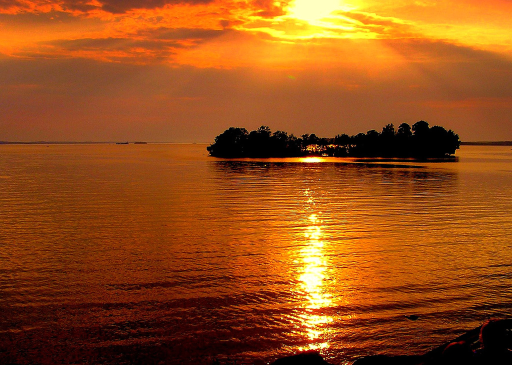 From Rastaholm, Ekerö in Sweden.